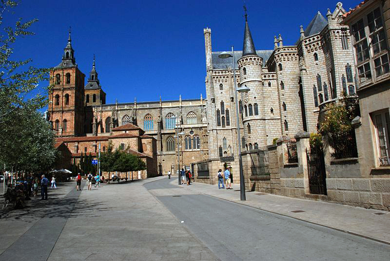 Catedral y palacio de Gaudi de Astorga